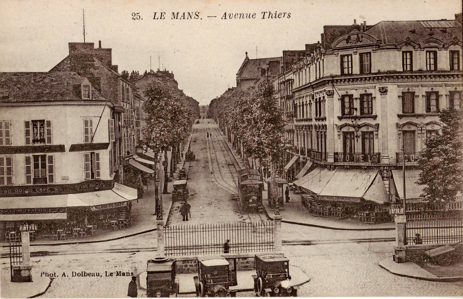 Carte postale ancienne éditée par A. Dolbeau au Mans, n°25 LE MANS - Avenue Thiers. Vue, depuis la gare du Mans (dont on voit les grilles fermant la cour où stationnent des taxis) vers la Place de la République.Derrière ces grilles passe la voie des Tramways de la Sarthe. Au delà se trouve le terminus de l'ancien Tramway du Mans en impasse, où stationne une motrice.